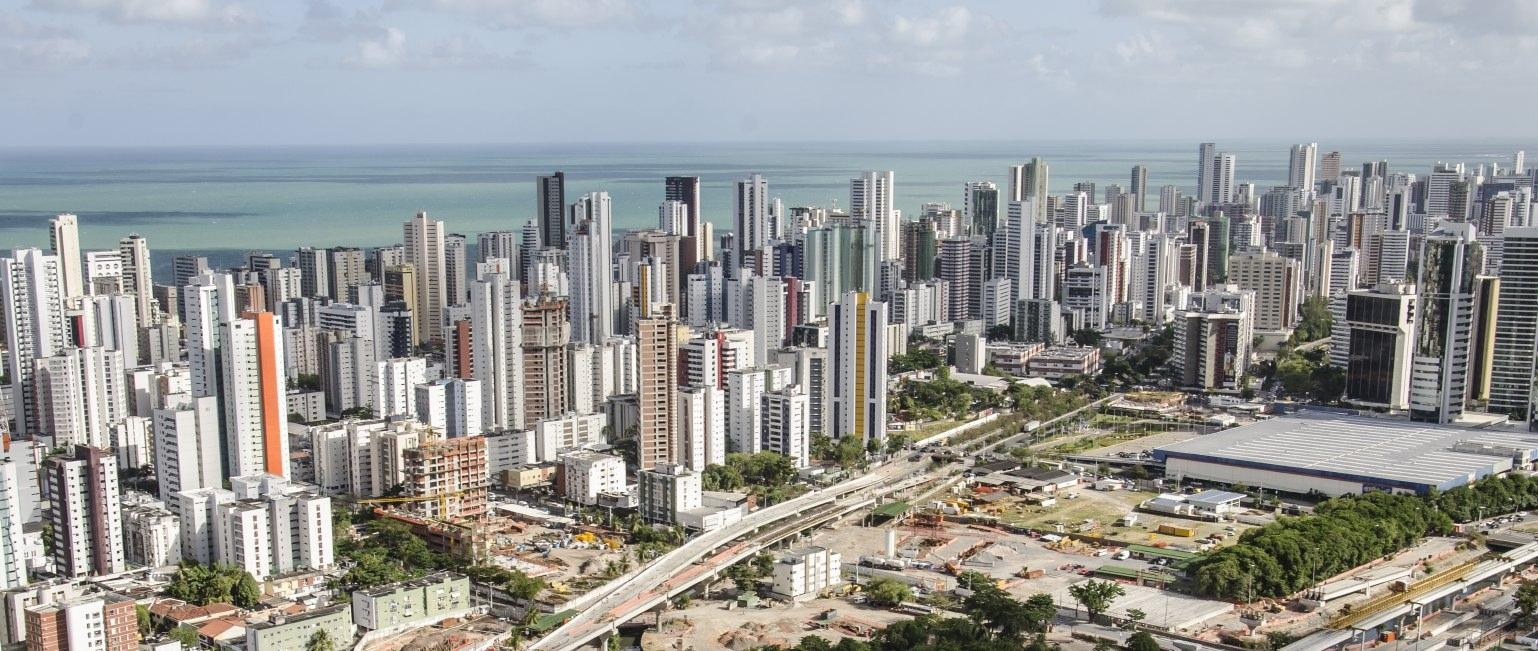 Mobilidade urbana em Recife..